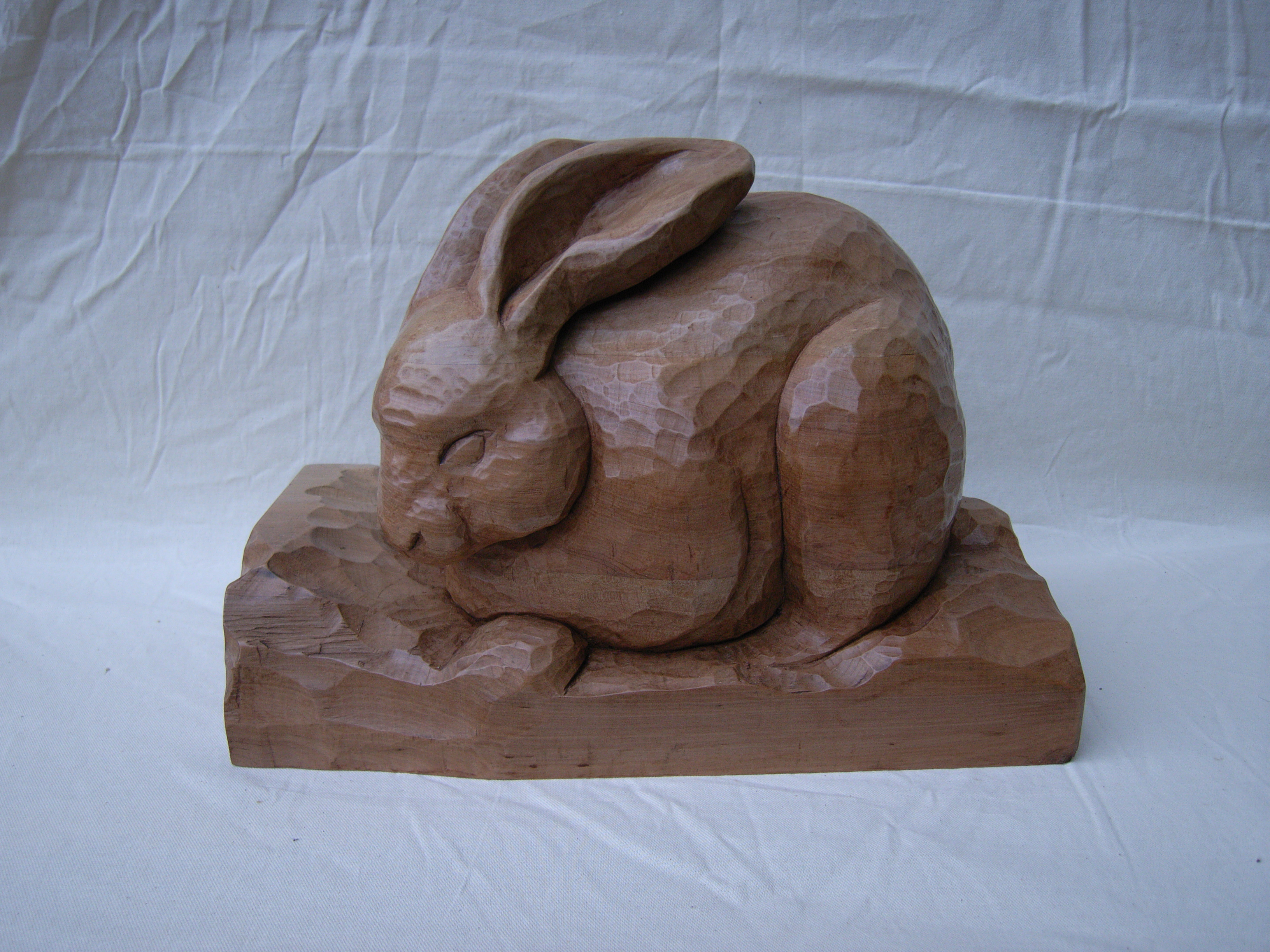 Sculpture de lapin en merisier